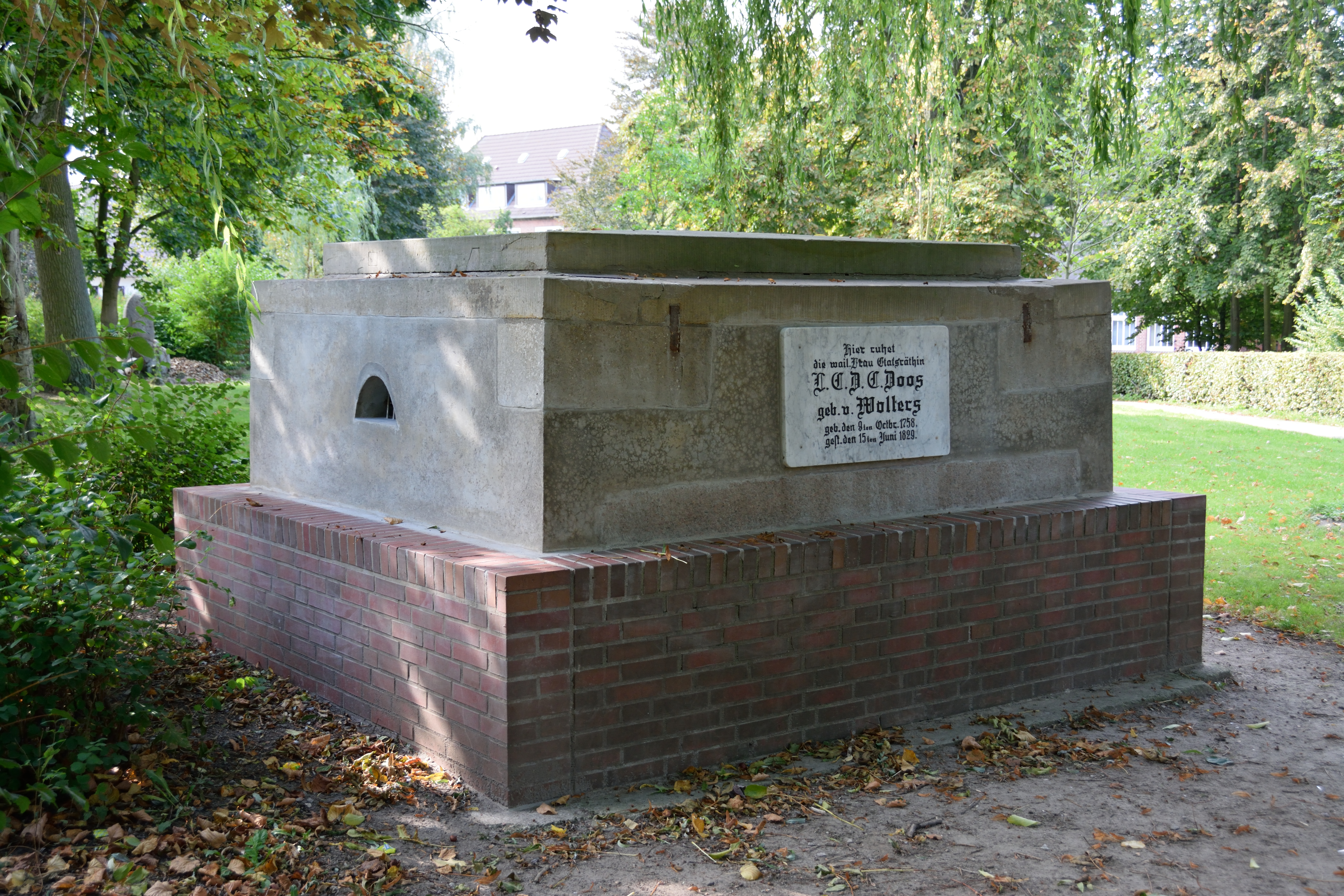 Impressionen aus dem Stadtpark Wilster Mausoleum für die Etatsrätin Doos (1758-1829)